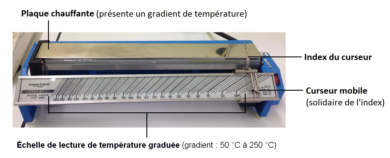 Appareil de laboratoire permettant de mesurer le point de fusion d'une substance solide avec une précision de l'ordre de 2 °C.